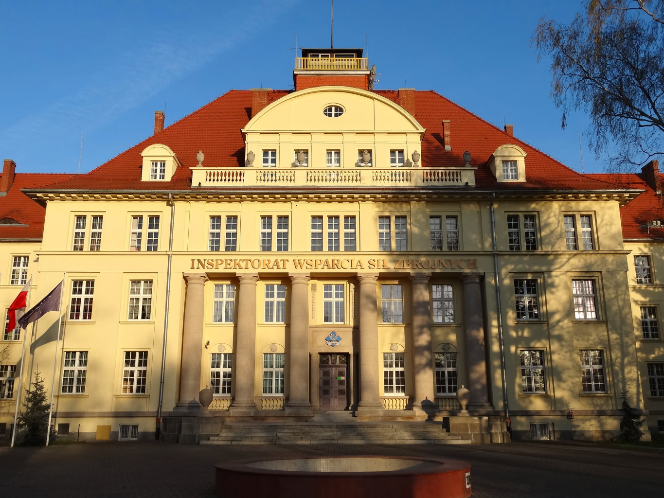 Gmach Inspektoratu Wsparcia Sił Zbrojnych w Bydgoszczy, ul. Gdańska 190, w latach 1945-2007 siedziba dowództwa Pomorskiego Okręgu Wojskowego